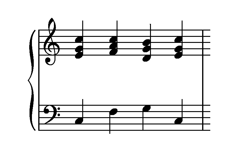 example for a cadence